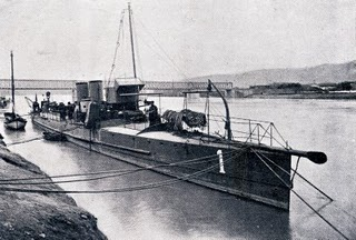 Torpedero T1, líder de su clase en marzo de 1915